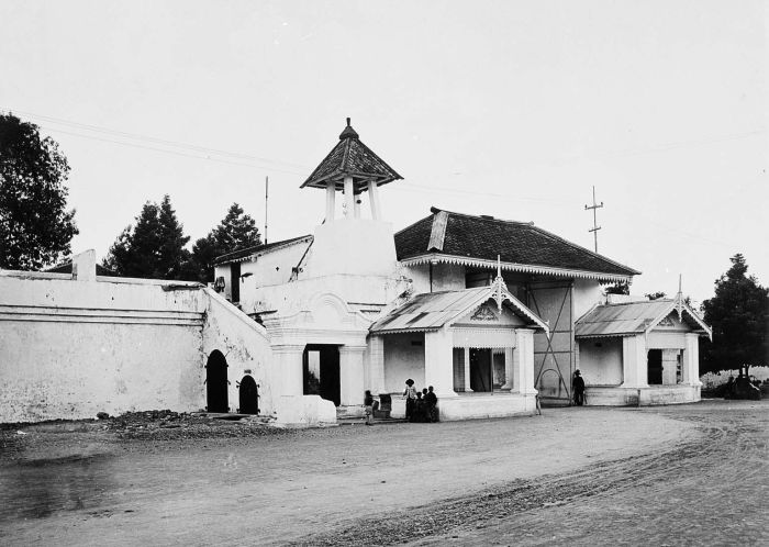 Foto. Wie op zoek naar de Midden-Javaanse kratons duizend-en-één-nacht paleizen, zal teleurgesteld worden. De gebouwen zijn laag, grotendeels van hout (branden zijn dan ook niet zeldzaam) en niet echt imposant, al vertonen ze wel fraaie houten ornamentiek. Erg oud zijn ze evenmin en de kraton van Solo is pas in 1745 gesticht (maar daar is niet veel meer van over). De vorsten van Solo, die de naam Pakoeboewono dragen, voeren de titel Susuhunan. De vorsten van Jogja, met de naam Hamengkoeboewono, voeren de titel Sultan. Solo en Jogja ontstonden bij het uiteenvallen van het Midden-Javaanse rijk Mataram. (P. Boomgaard, 2001). Toegangspoort tot de kraton van Solo